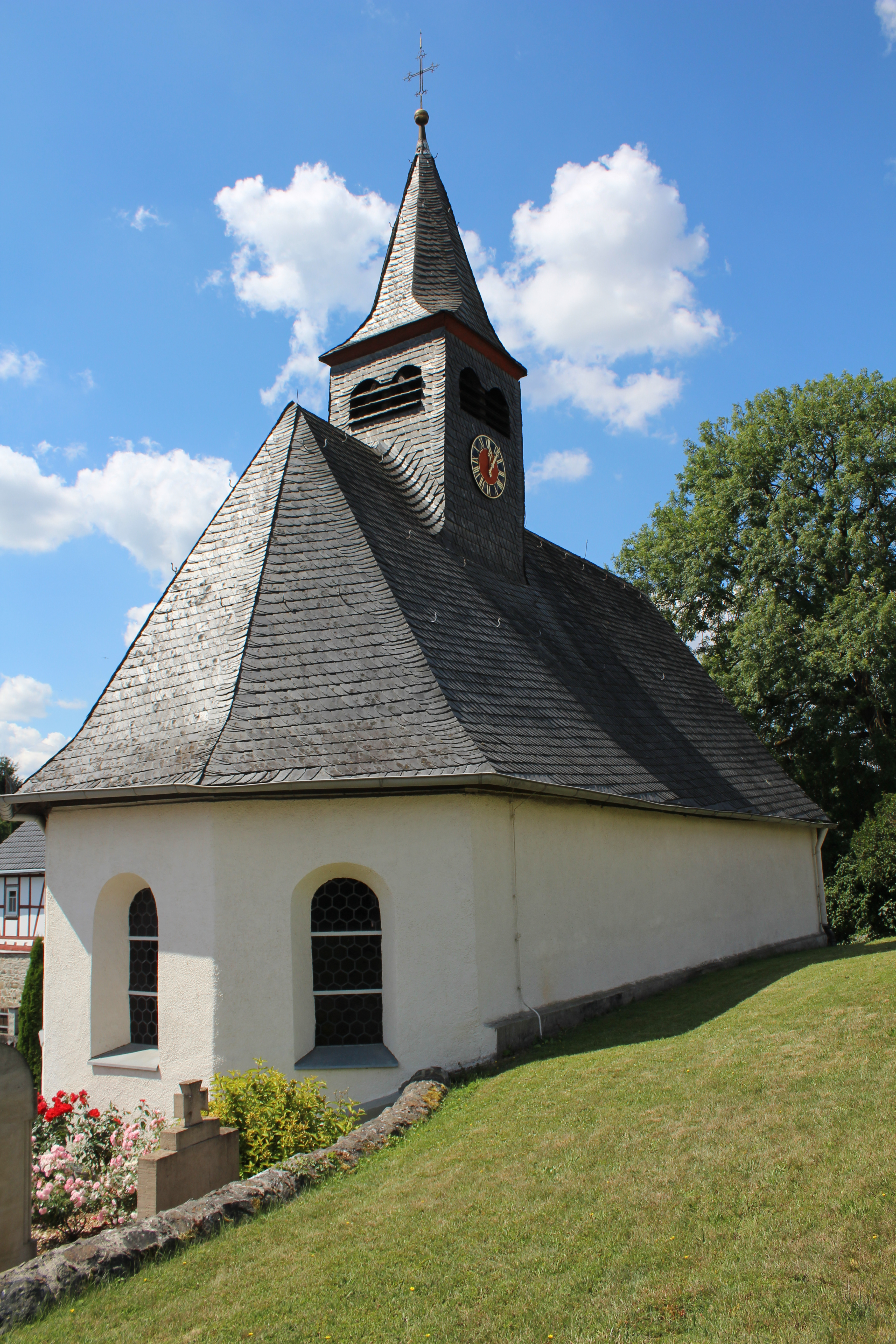 Evangelische Kirche Oberquembach, Gemeinde Schöffengrund, Hessen, Deutschland